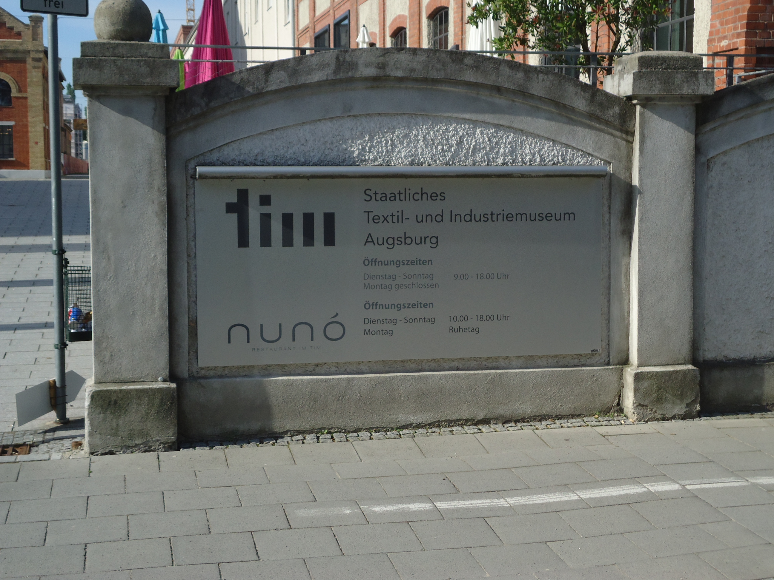 Eingangstafel Textilmuseum Augsburg